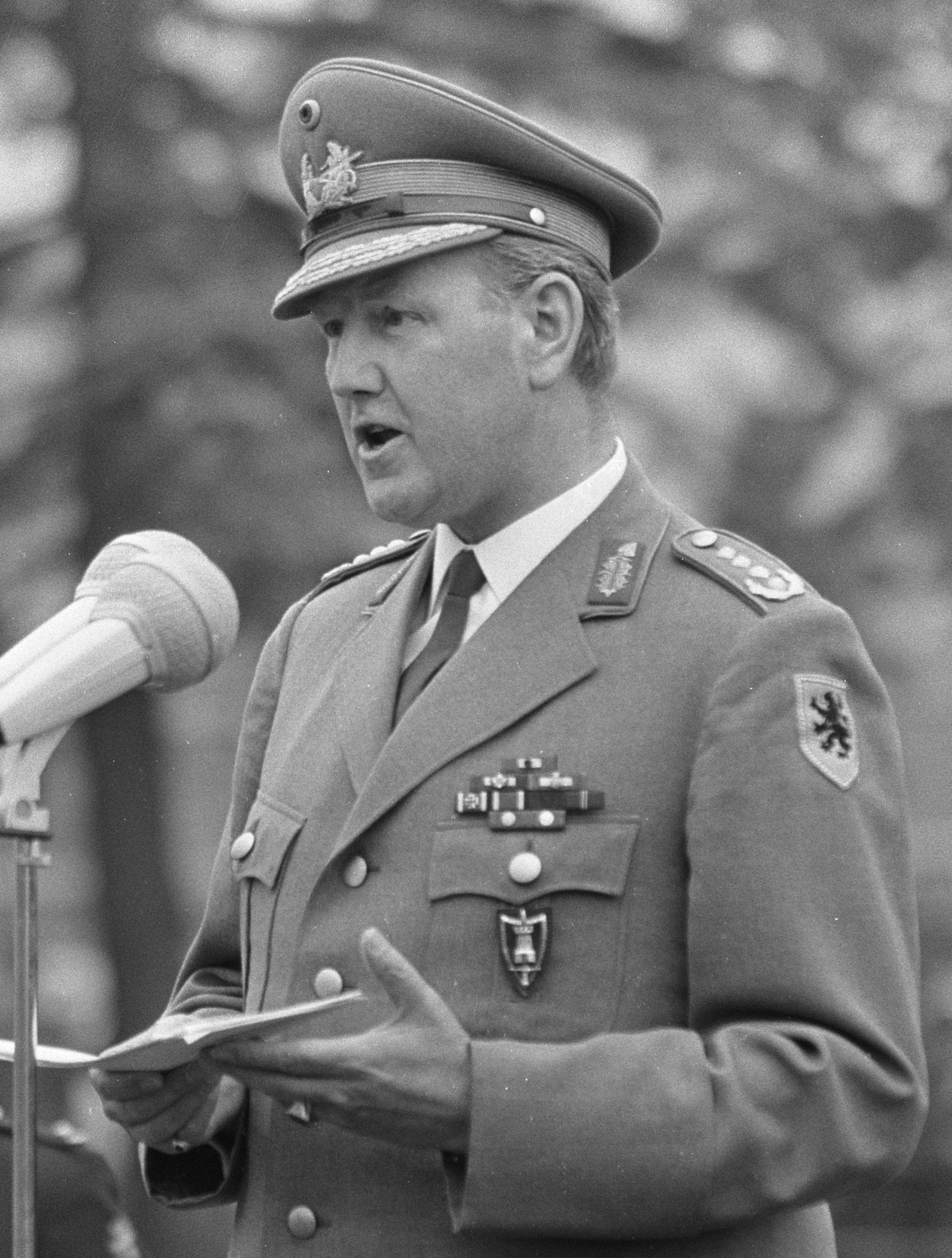 Officiele opening NAVO-Hoofdkwartier te Brunssum, Von Kielmansegg aan het woord (kop) Datum